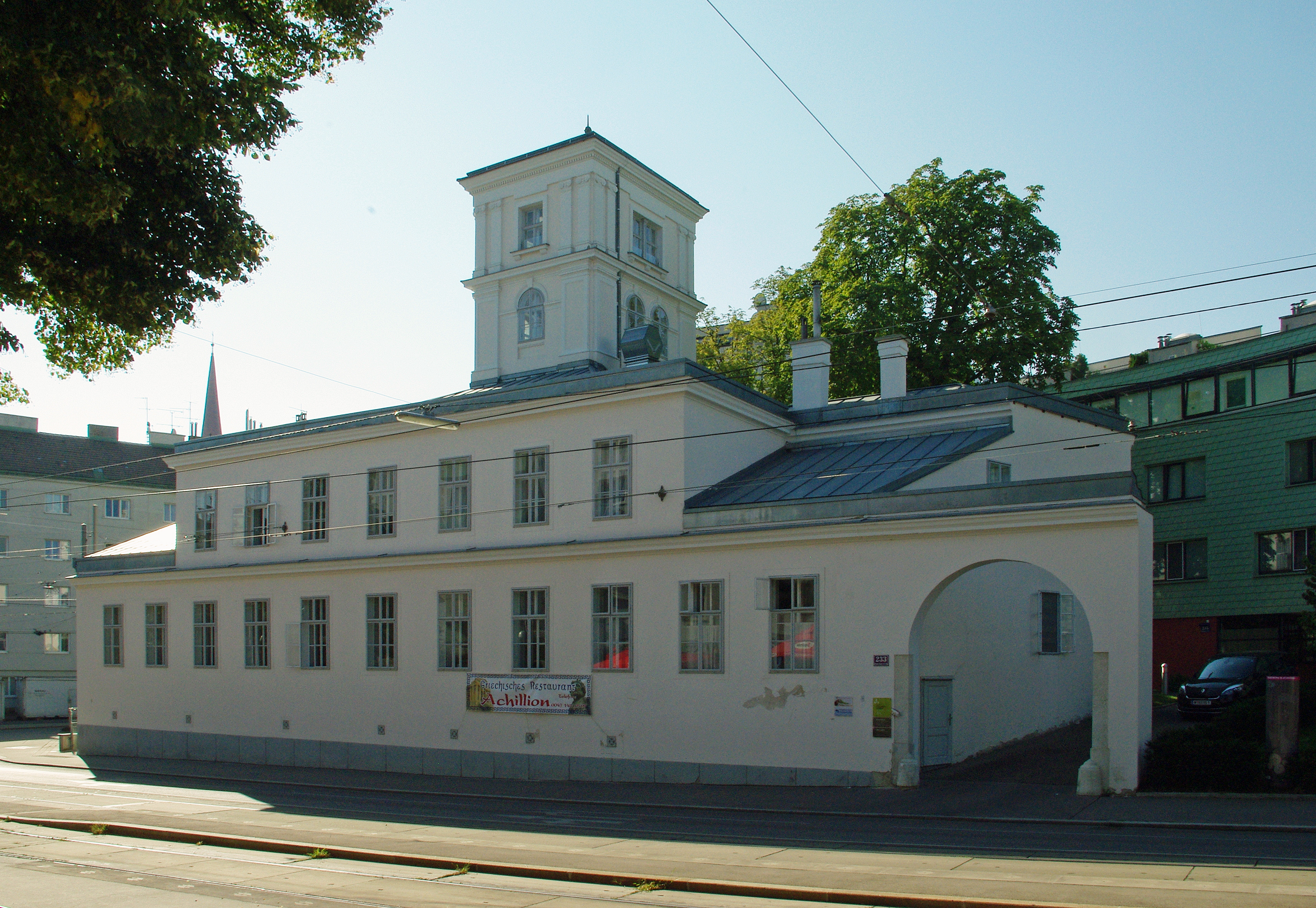 Kornhäusl Villa